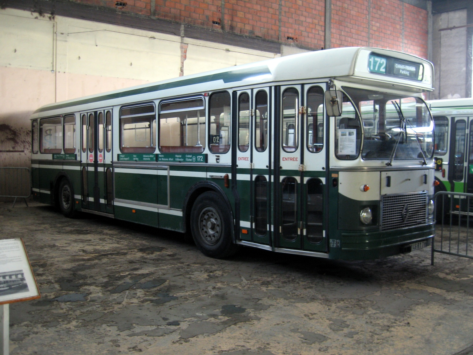 SC10 UO ex 9157 de la RATP de l'Association Bus Parisiens remisé à l'AmtuirJournées du patrimoine AMTUIR 15/09/2007.